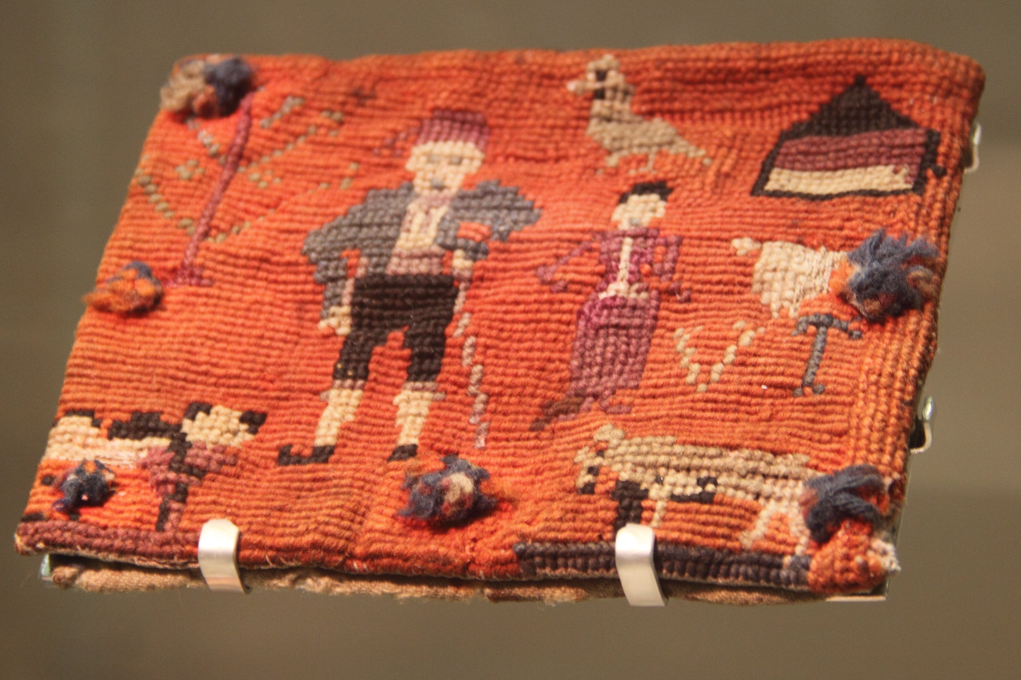 Laine et cuir 10 x 15 cm XIXème si_cle, Montory (Soule) Inv. 178 Don Gabaston-Casamajor en 1923Euskara: Canevas puntuz brodaturiko gatzakutoa artilea eta larrua 10 x 15 zm XIX mendea, Borirze (Zuberoa) Inb. 178 Gaston-Casamajoren emaitza 1923an